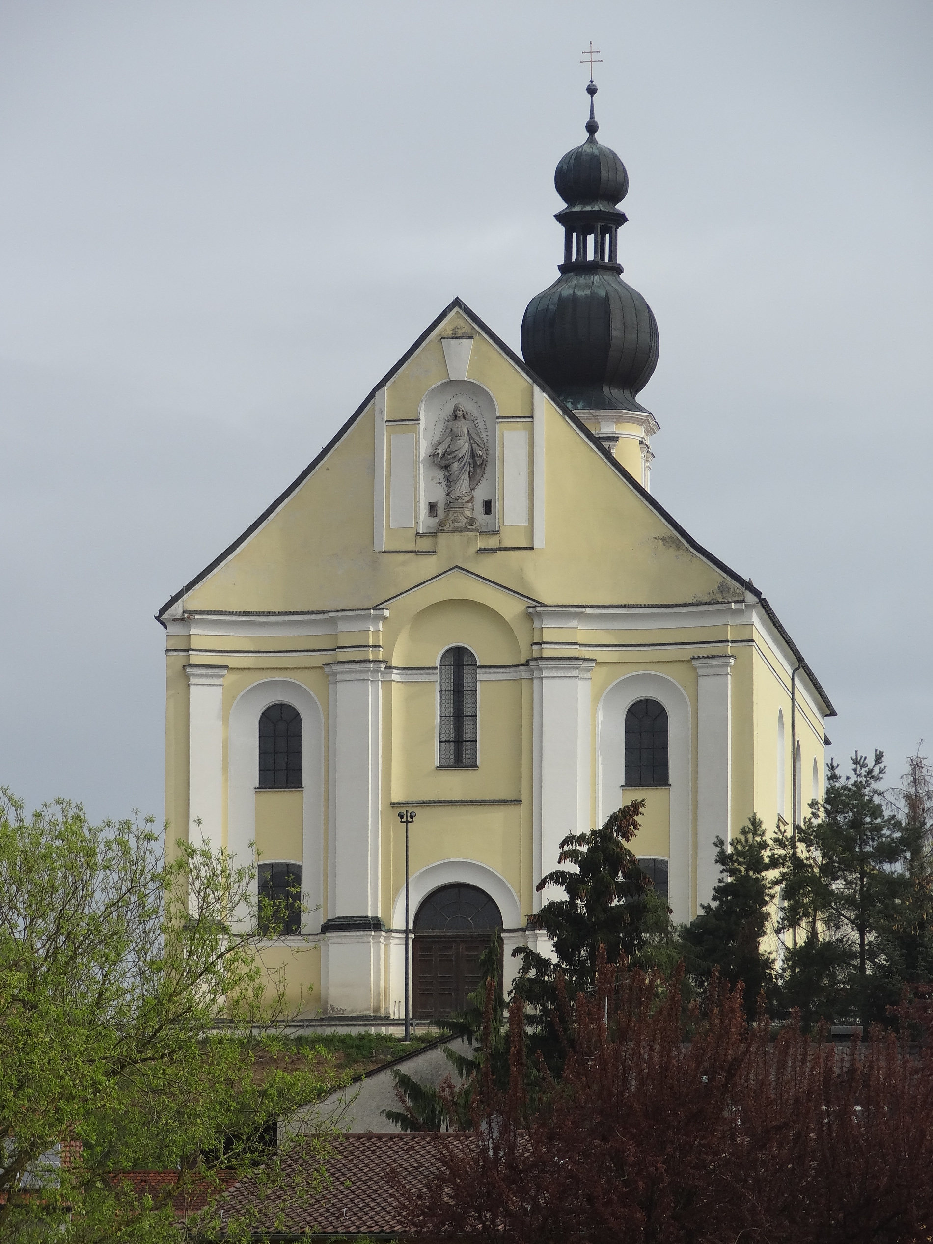 Kurvierte Südfassade der Wallfahrtskirche Maria Schnee in Aufhausen (Lkr. Regensburg)